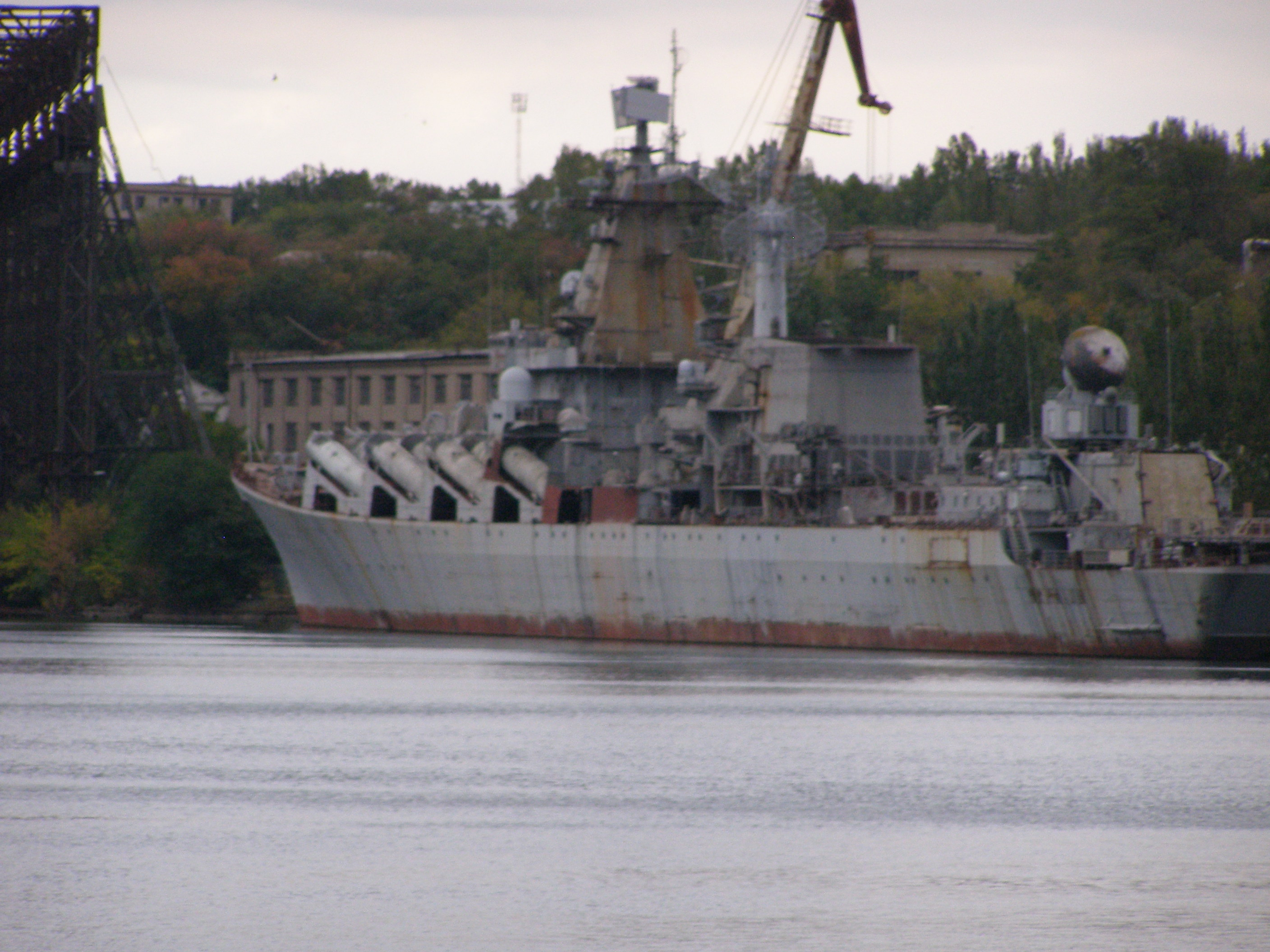 Ракетный крейсер "Украина" у стенки завода им. 61 Коммунара 1 октября 2009 года